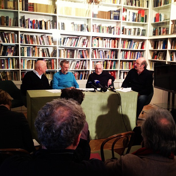 Zelo obiskana tiskovka @odborsi , KOKS, TRS, zraven mene SiOL.